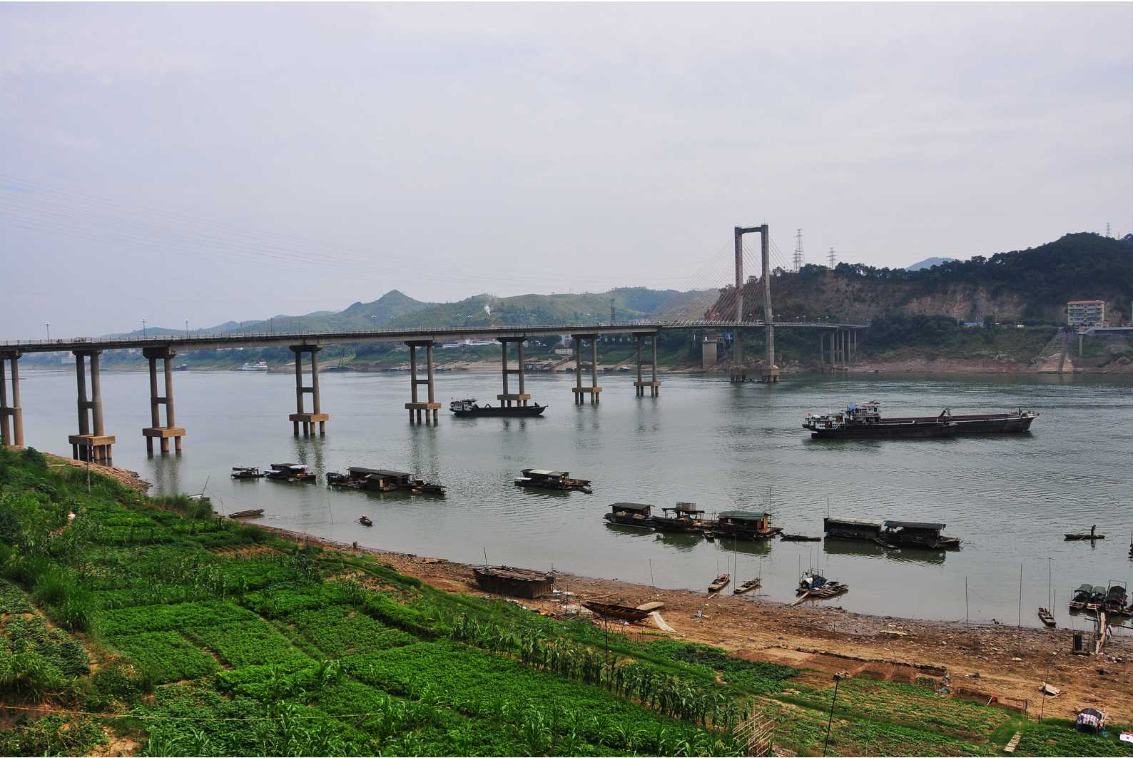 Guizhou_0061